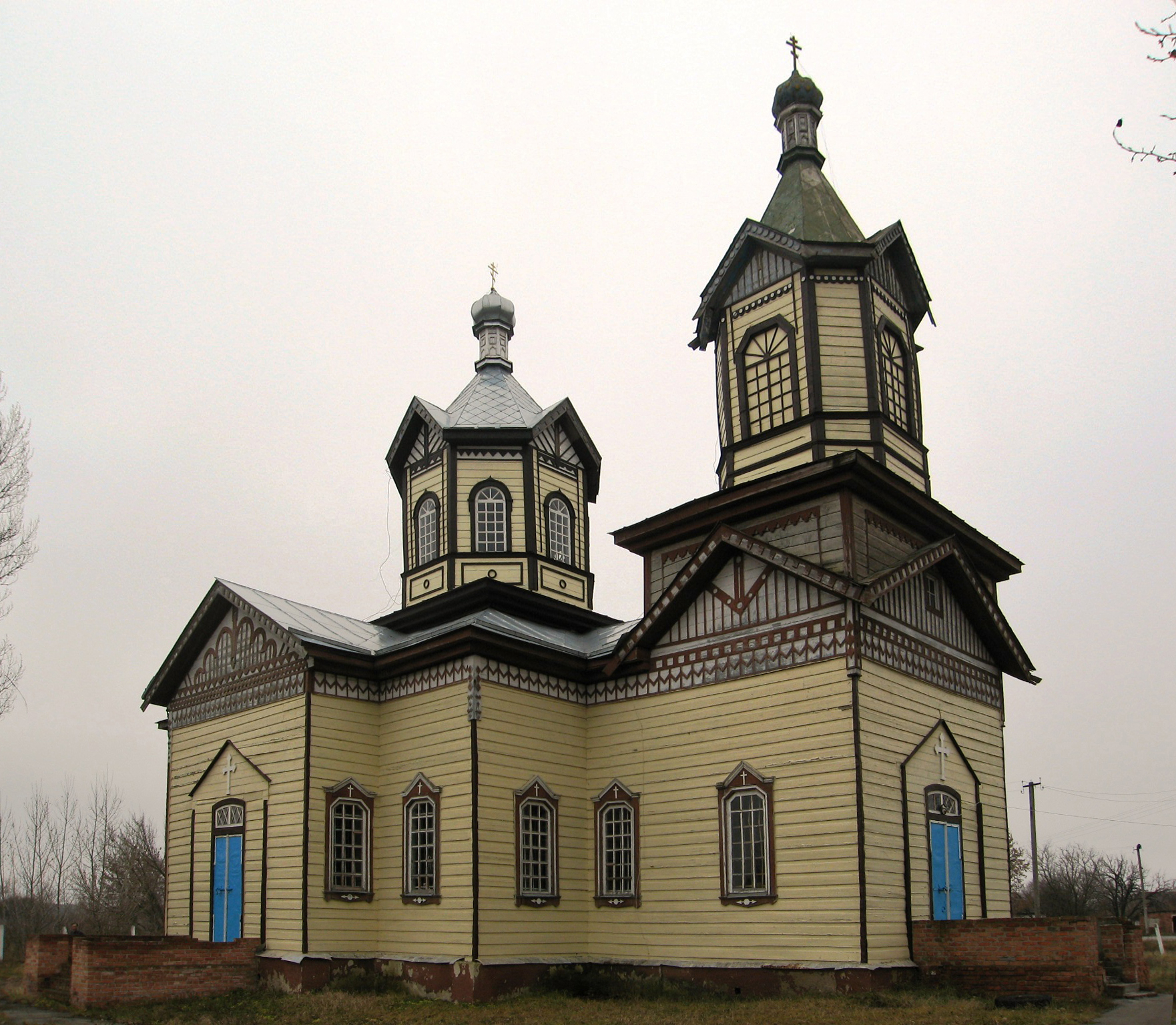 Миколаївська дерев'яна церква 1870-х рр., с.Орчик, Зачепилівський р-н., Харківська обл.